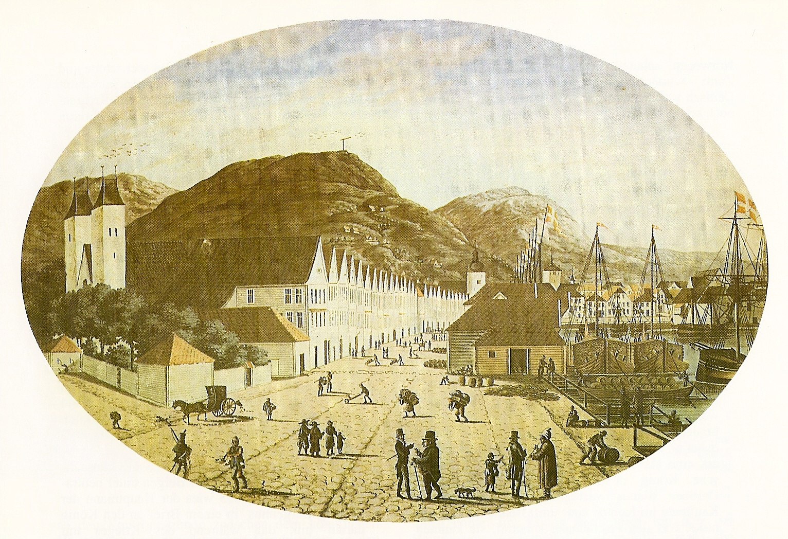 Die Deutsche Brücke in Bergen (Bryggen). Aquarell von Joh. F. L. Dreier, 1817